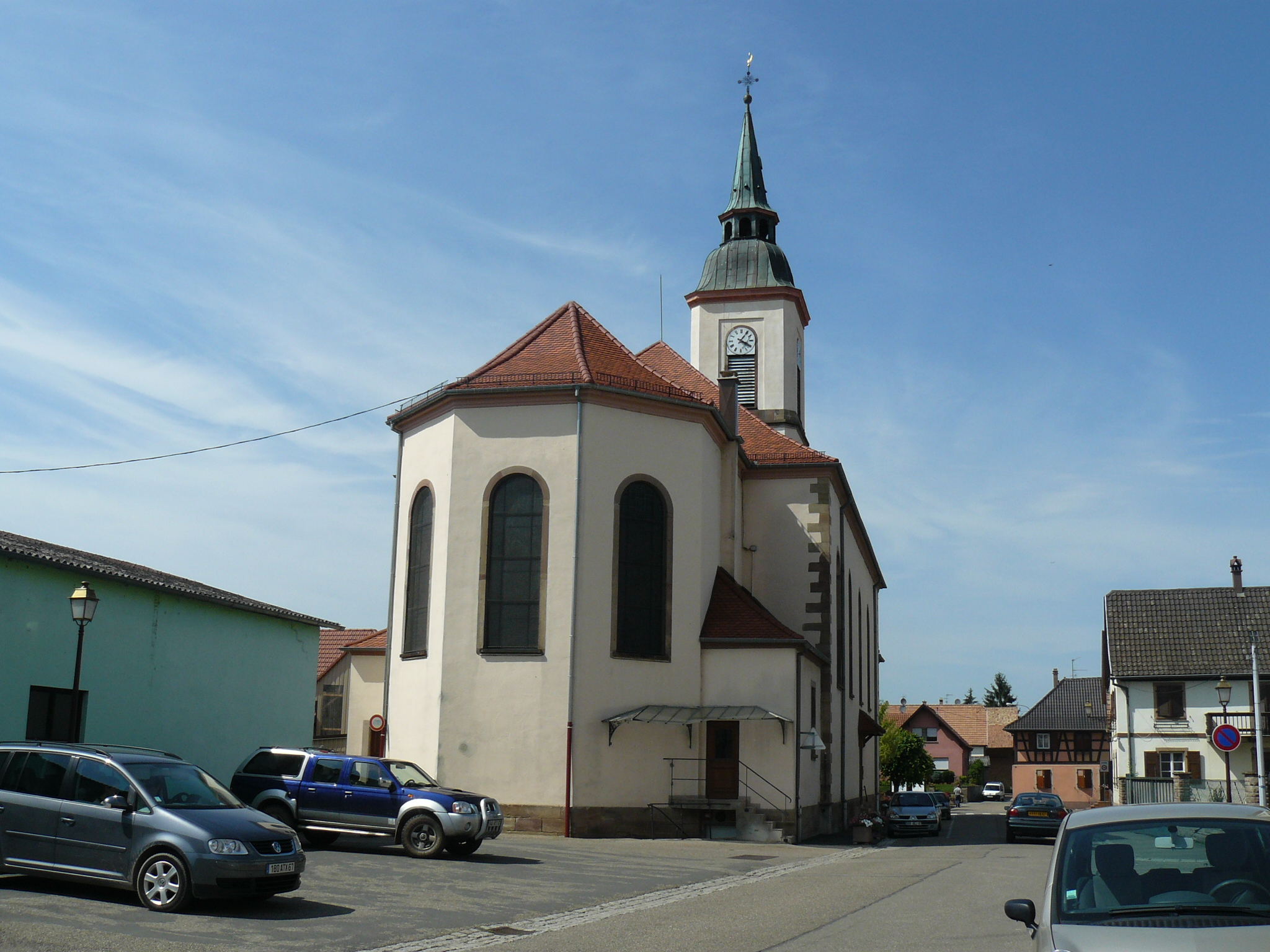 Église Saint-Epvre (1815) Krautergersheim, Strasbourg, Bas-Rhin